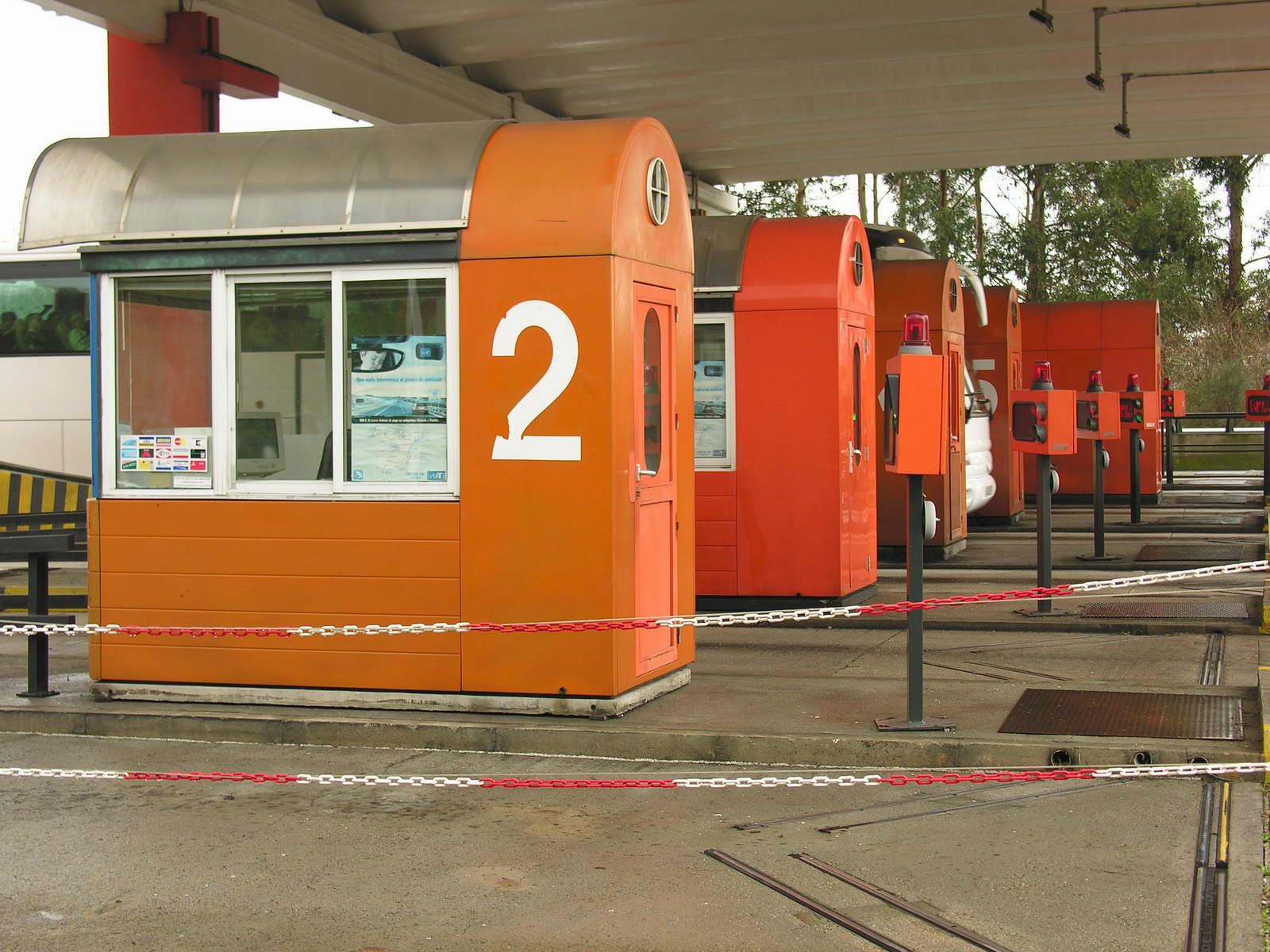 Galicia - Spain.